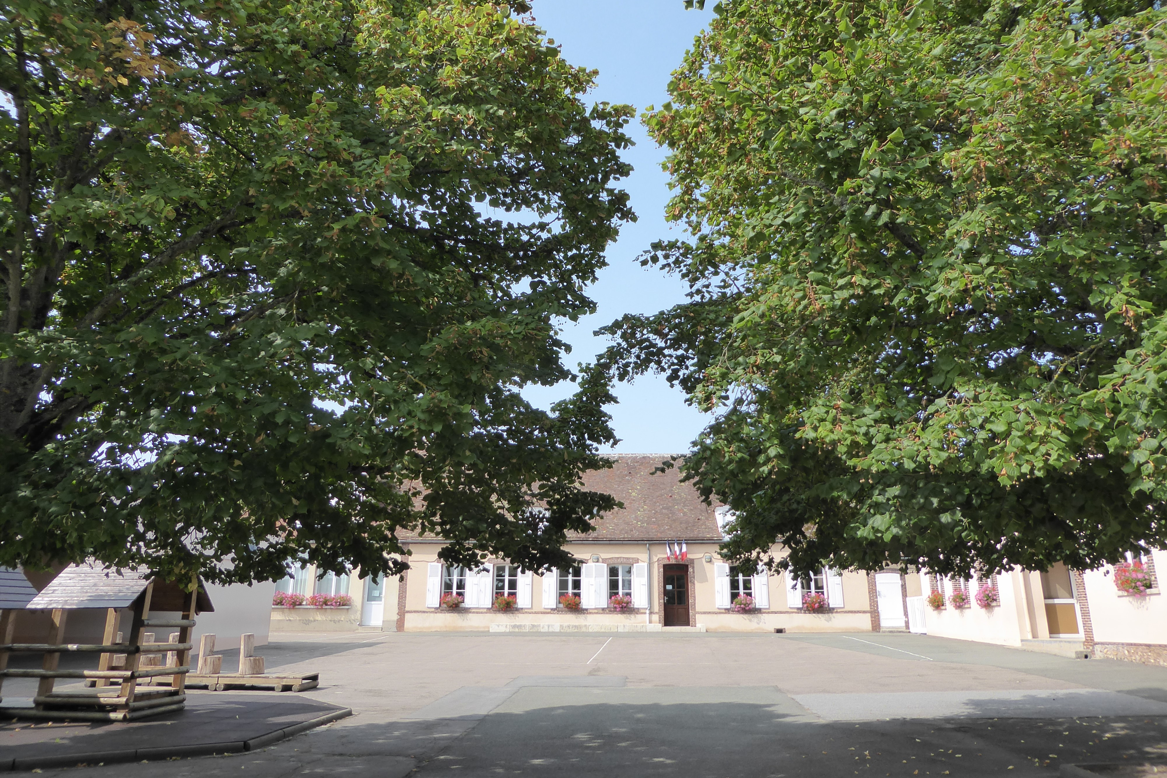 mairie, Landelles, Eure-et-Loir (France).